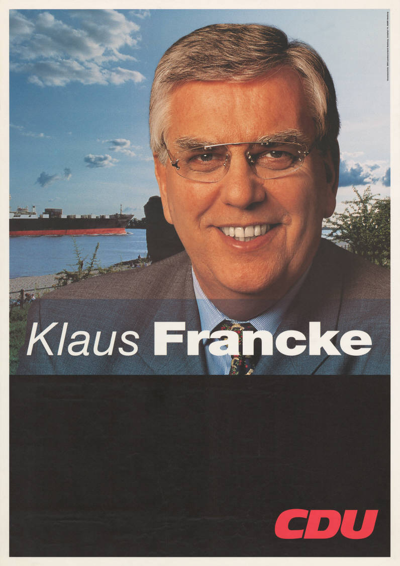 Klaus Francke CDU Abbildung: Porträtfoto vor Elbe-Hintergrund/Tanker Kommentar: Datierung unsicher Plakatart: Kandidaten-/Personenplakat mit Porträt Auftraggeber: Verantw.: CDU-LV Hamburg Objekt-Signatur: 10-031 : 817 Bestand: CDU-Plakate (10-031) GliederungBestand10-18: Personenplakate Lizenz: KAS/ACDP 10-031 : 817 CC-BY-SA 3.0 DE